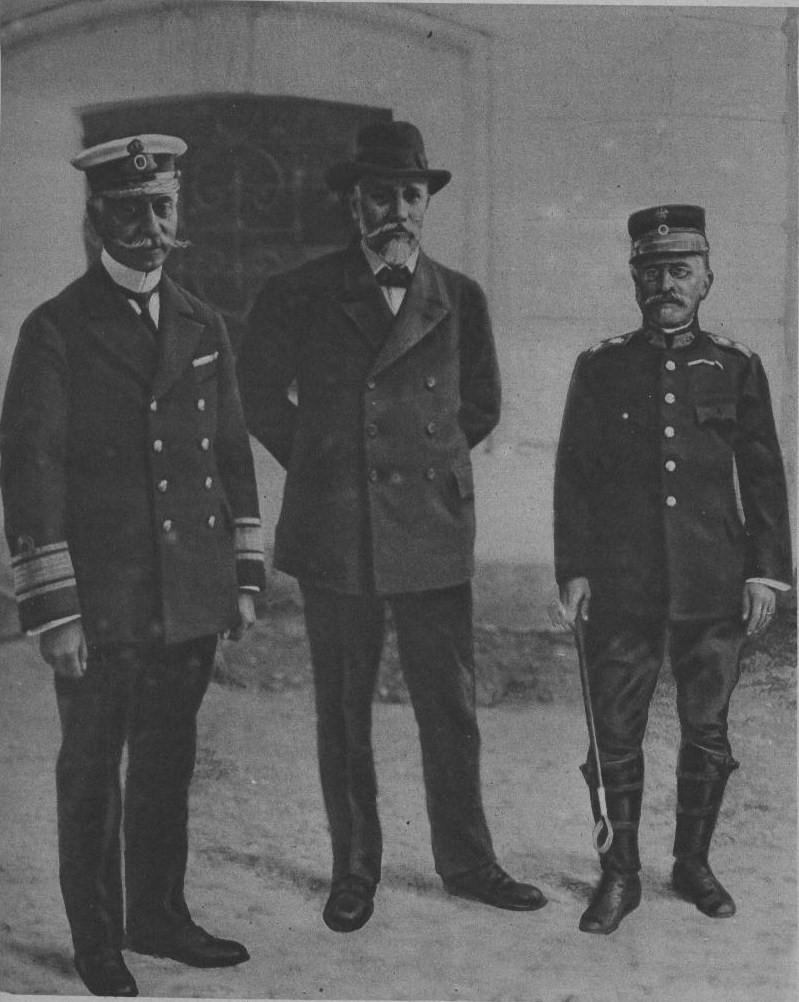 L'amiral Koundouriotis, Elefthérios Venizelos et le général Danglis, triumvirs du Comité de Défense nationale, posant pour Le Miroir journal français édité le 12 novemnbre 1916.